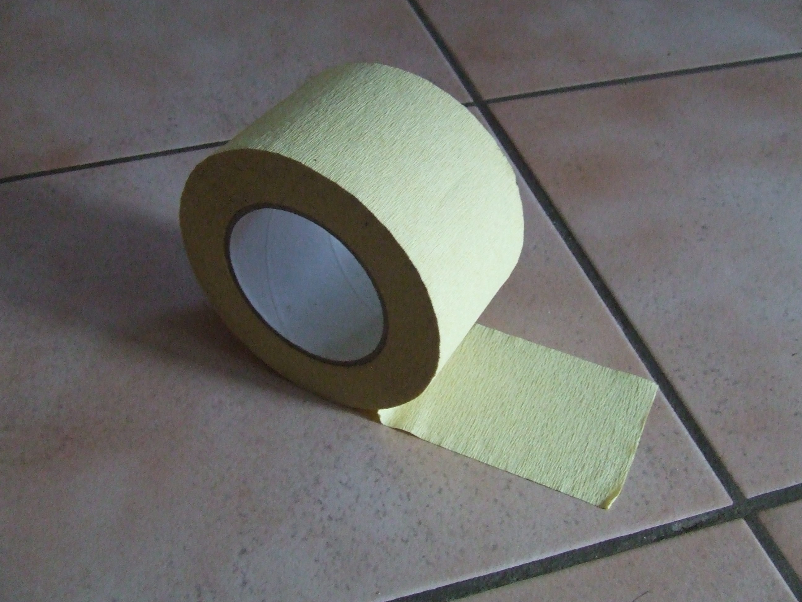 Eine Rolle breites Malerkrepp-Klebeband.